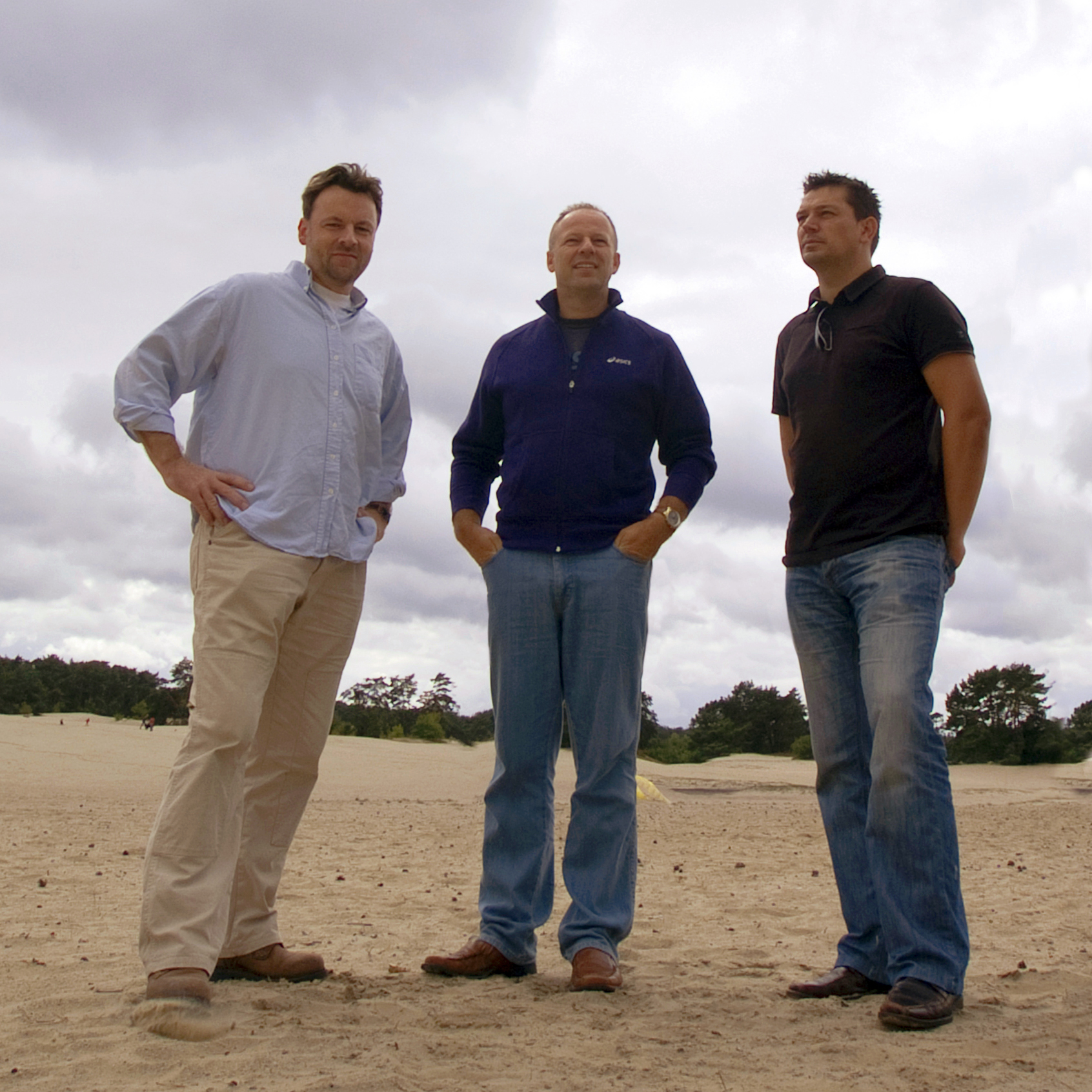 Odyssice in 2012: Bastiaan Peeters, Menno Boomsma en Jeroen van der Wiel